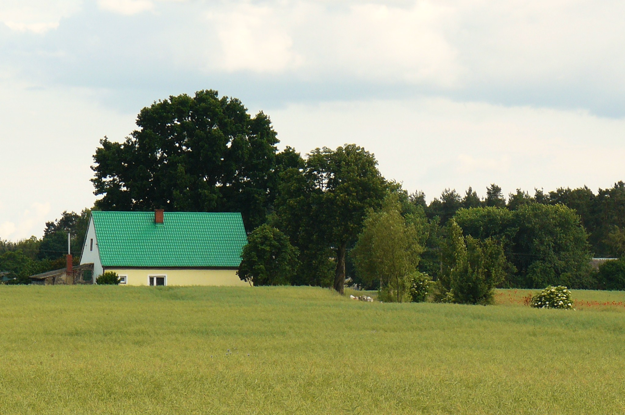 Lechlińskie Huby - gm. Skoki.